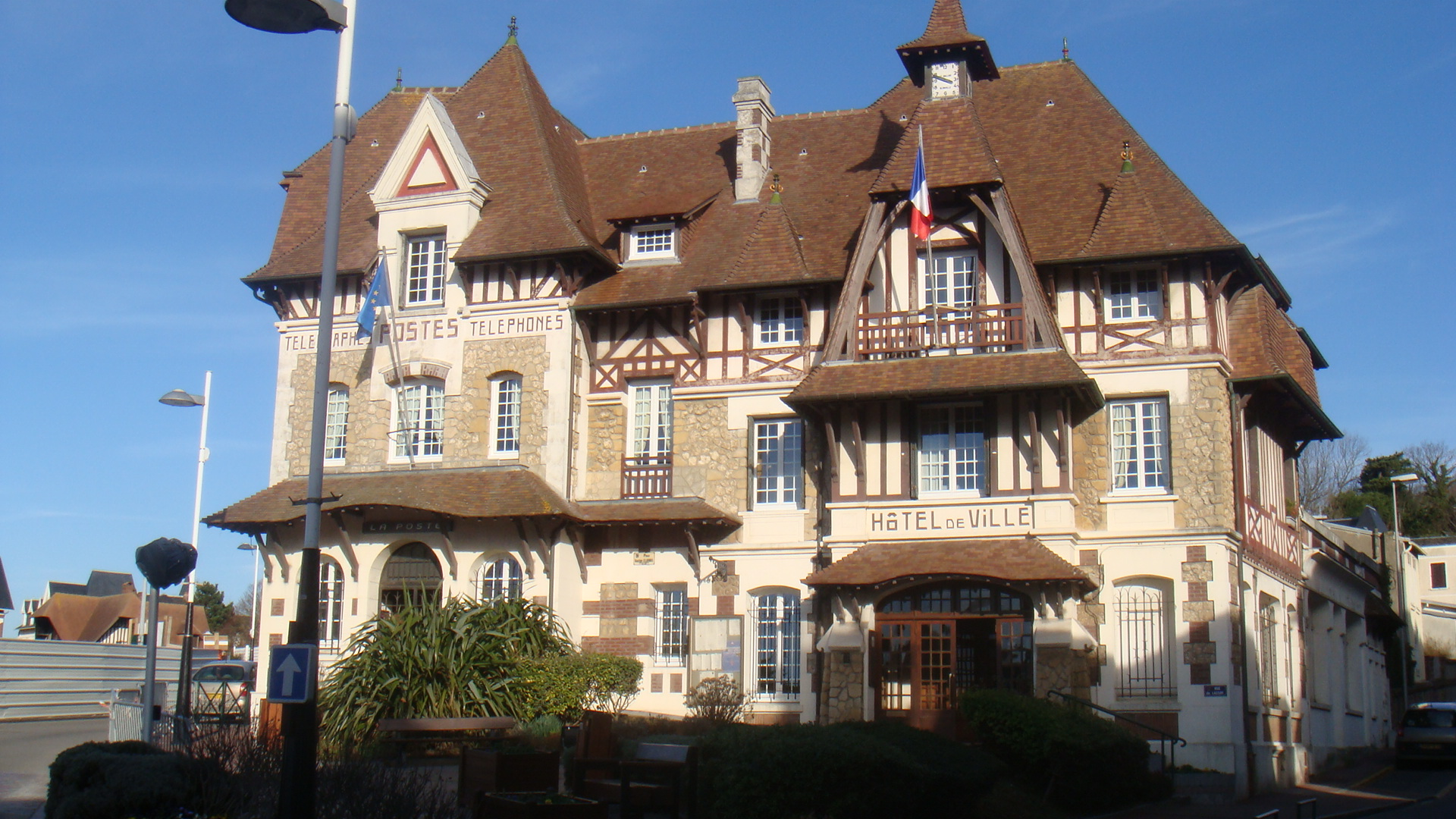 blonvillemairie